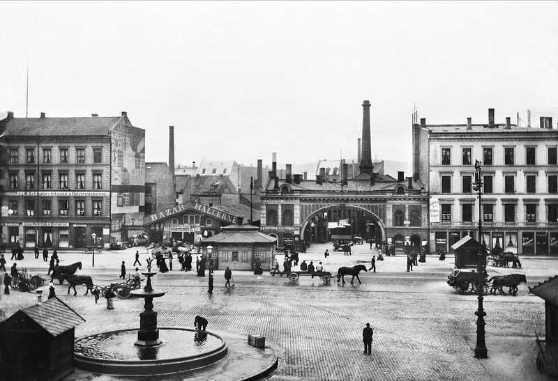 Basarhallene på Youngstorget som lå der Folketeaterbygningen ligger nå. Youngstorget 2, Youngstorget 3 og Youngstorget 1.torg, mennesker, gateliv, fontene, Basarhallene, forretningsgårder.